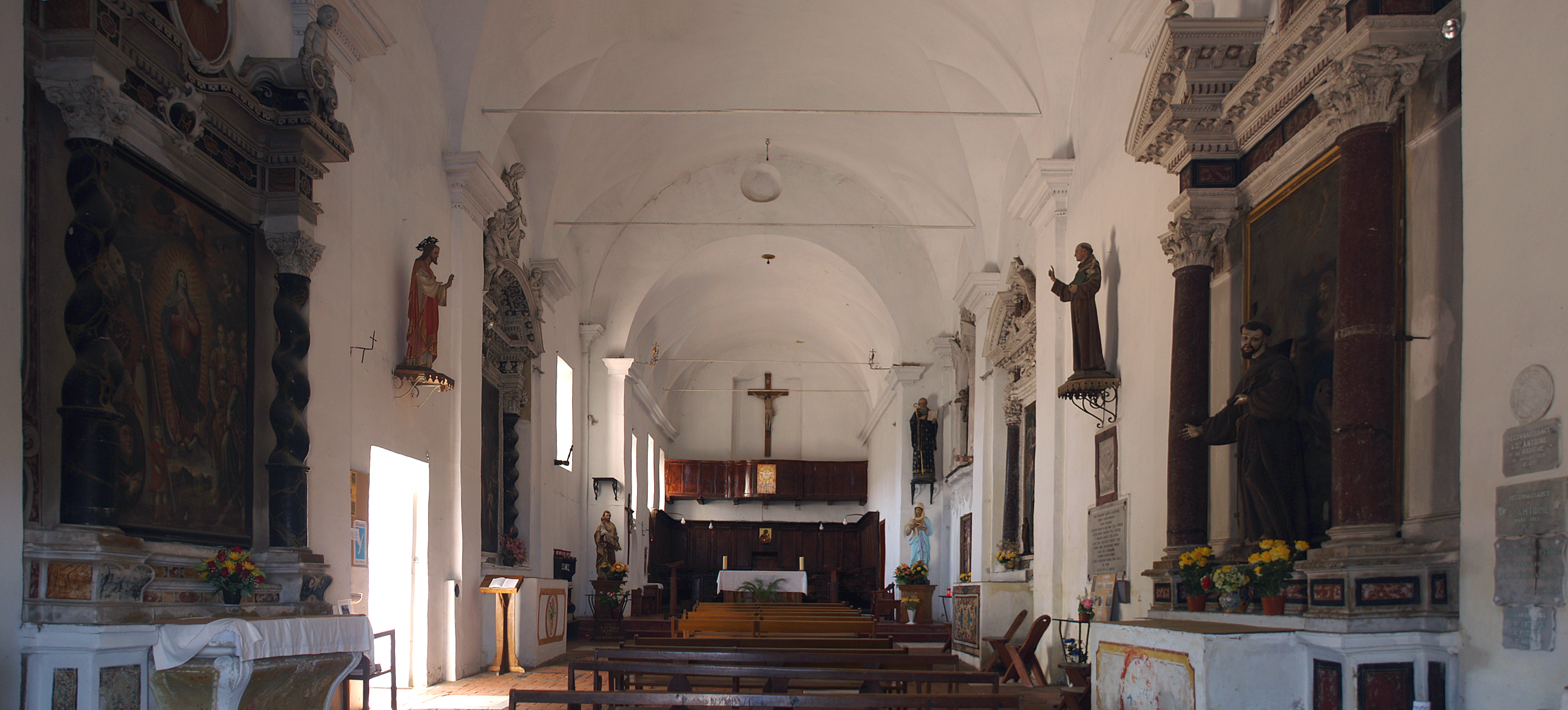 Cateri - Eglise du couvent de Marcassu